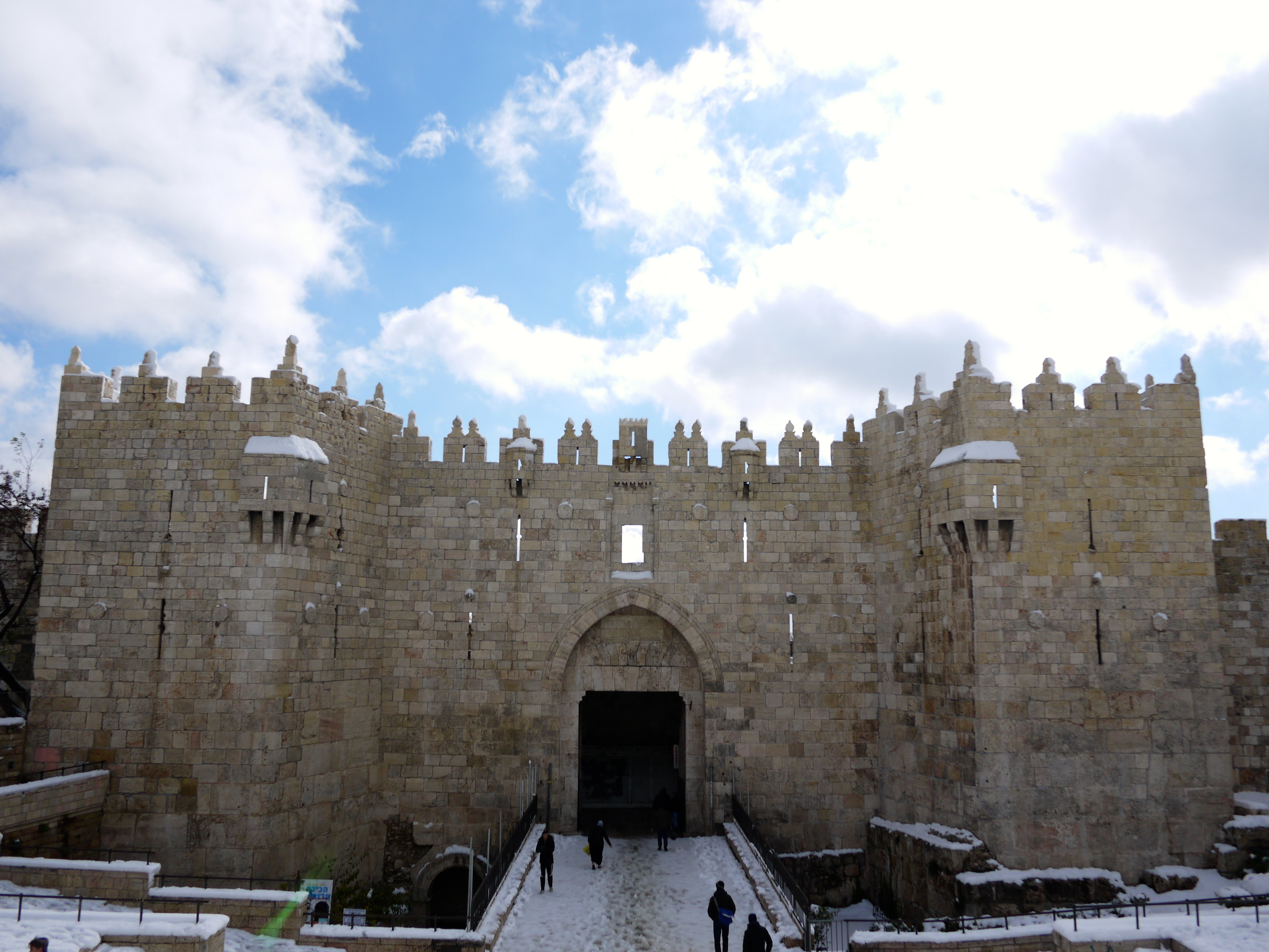 Damascus gate Jerusalem